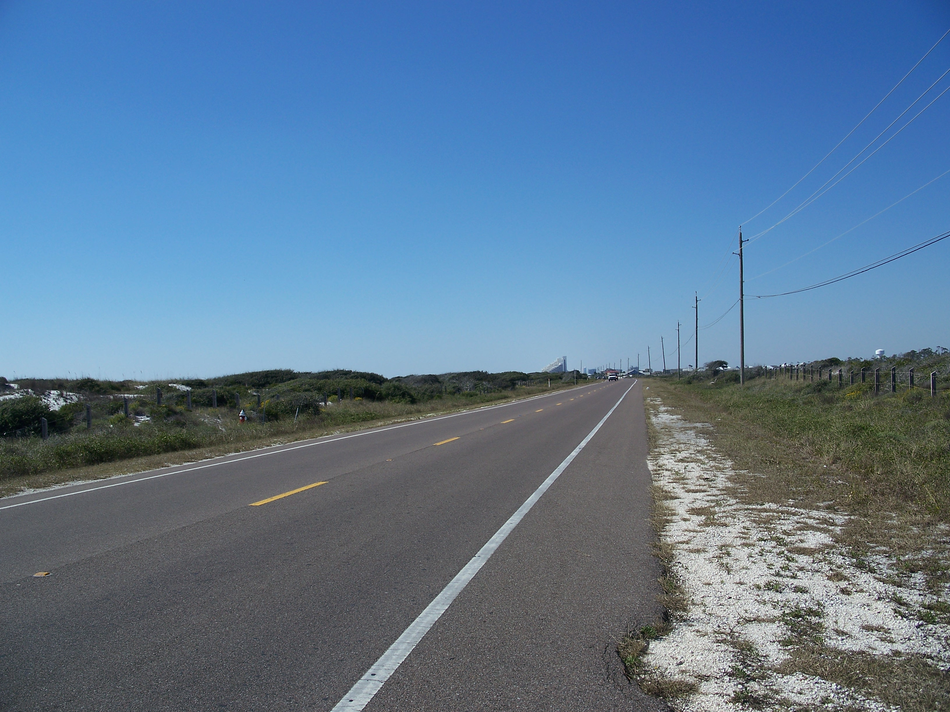 Perdido Key State Park: State Road 292, looking west